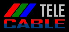 Logo de la antigua empresa peruana Telecable.